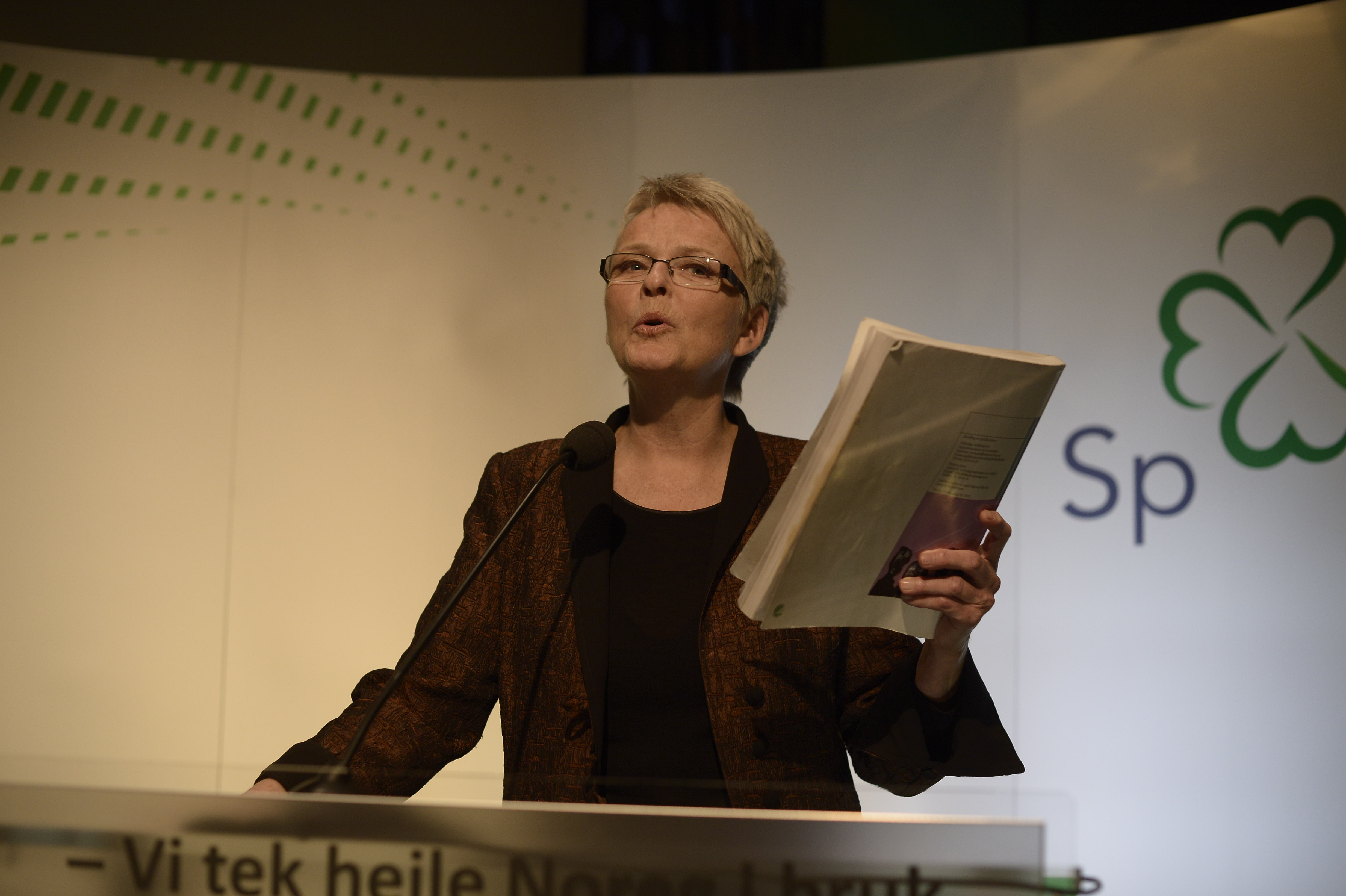 Anne Enger på Senterpartiets landsmøte 2013